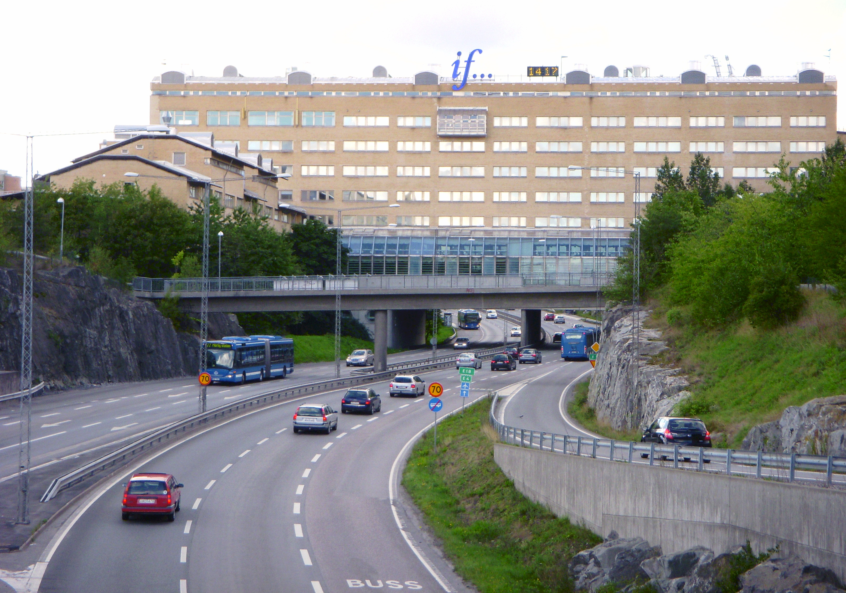 Bergshamraleden västerut med if-byggnaden